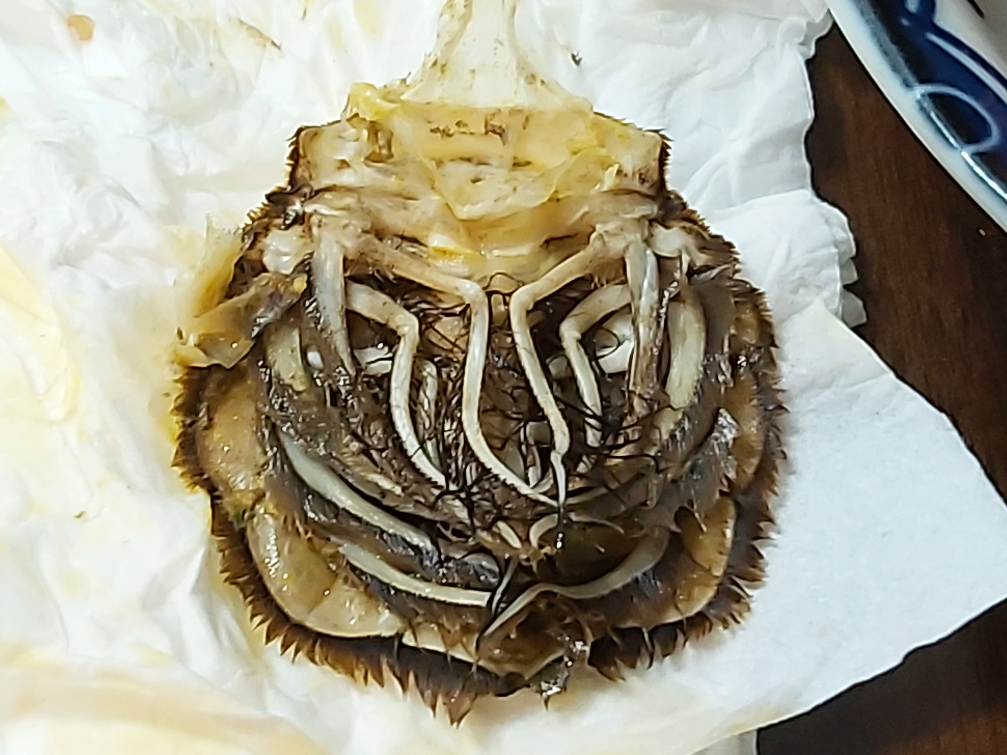 日常食用的大閘蟹的尾部掰開再反過來，顯示內裡隱藏的附足。